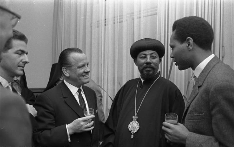 Ökumenische Persönlichkeiten Empfang des Bundesministers Lücke im Hotel "Königshof"